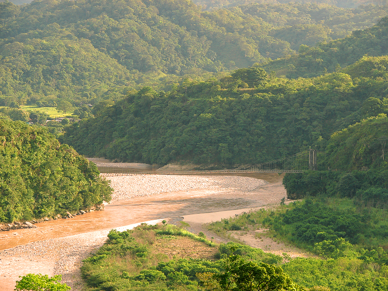 Río Torbes, cerca de su desembocadura en el río Uribante